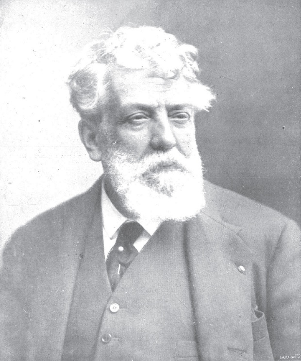 Francisco Domíngo Marqués; Obra del fotógrafo Kaulak Kaulak.